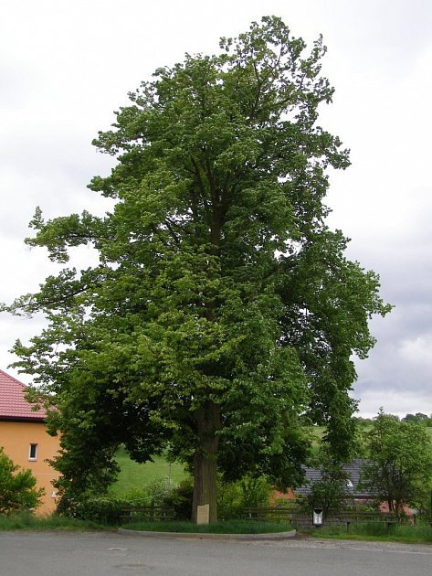 Lípa svobody na Skaličce